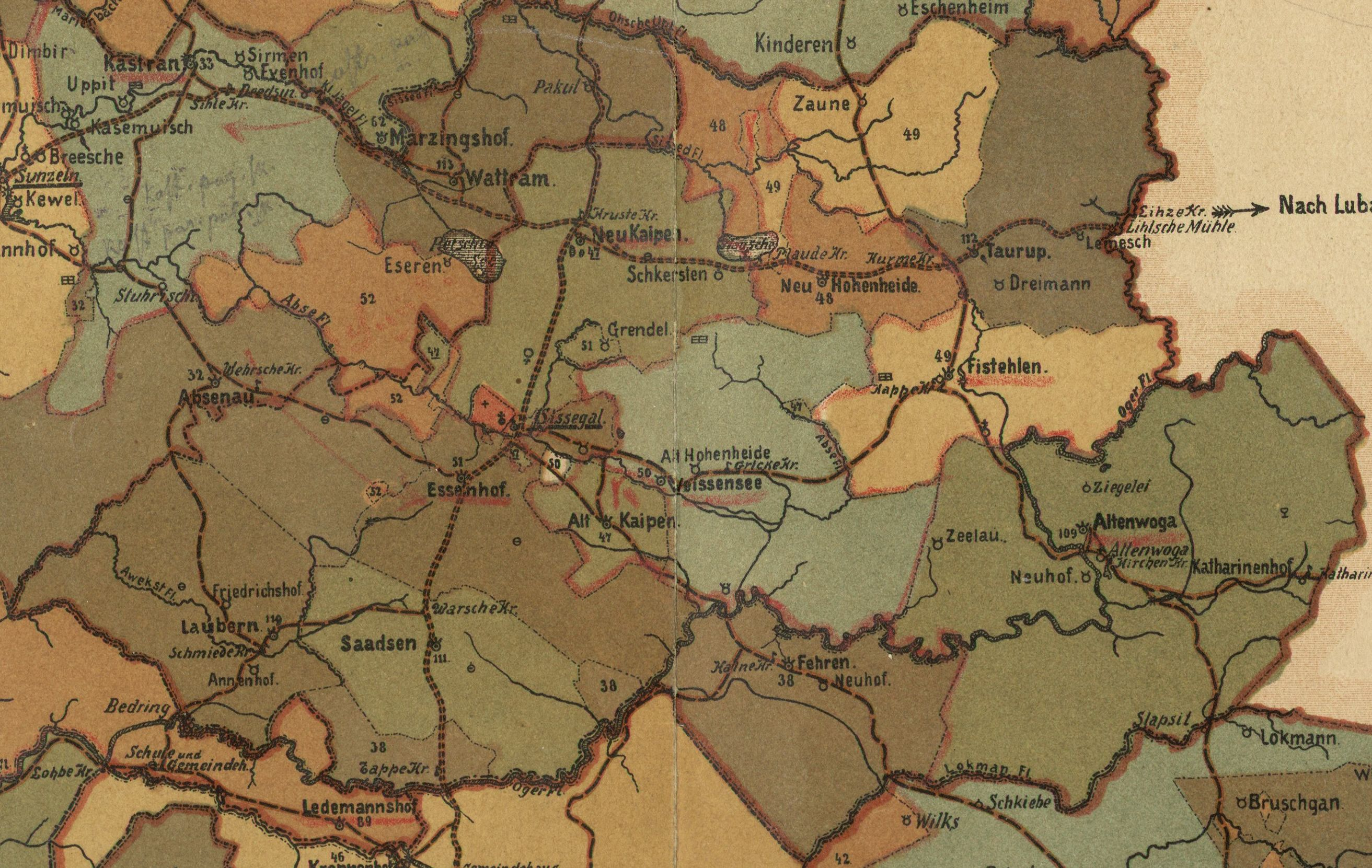 Madliena kihelkonna mõisad 1905. aastal